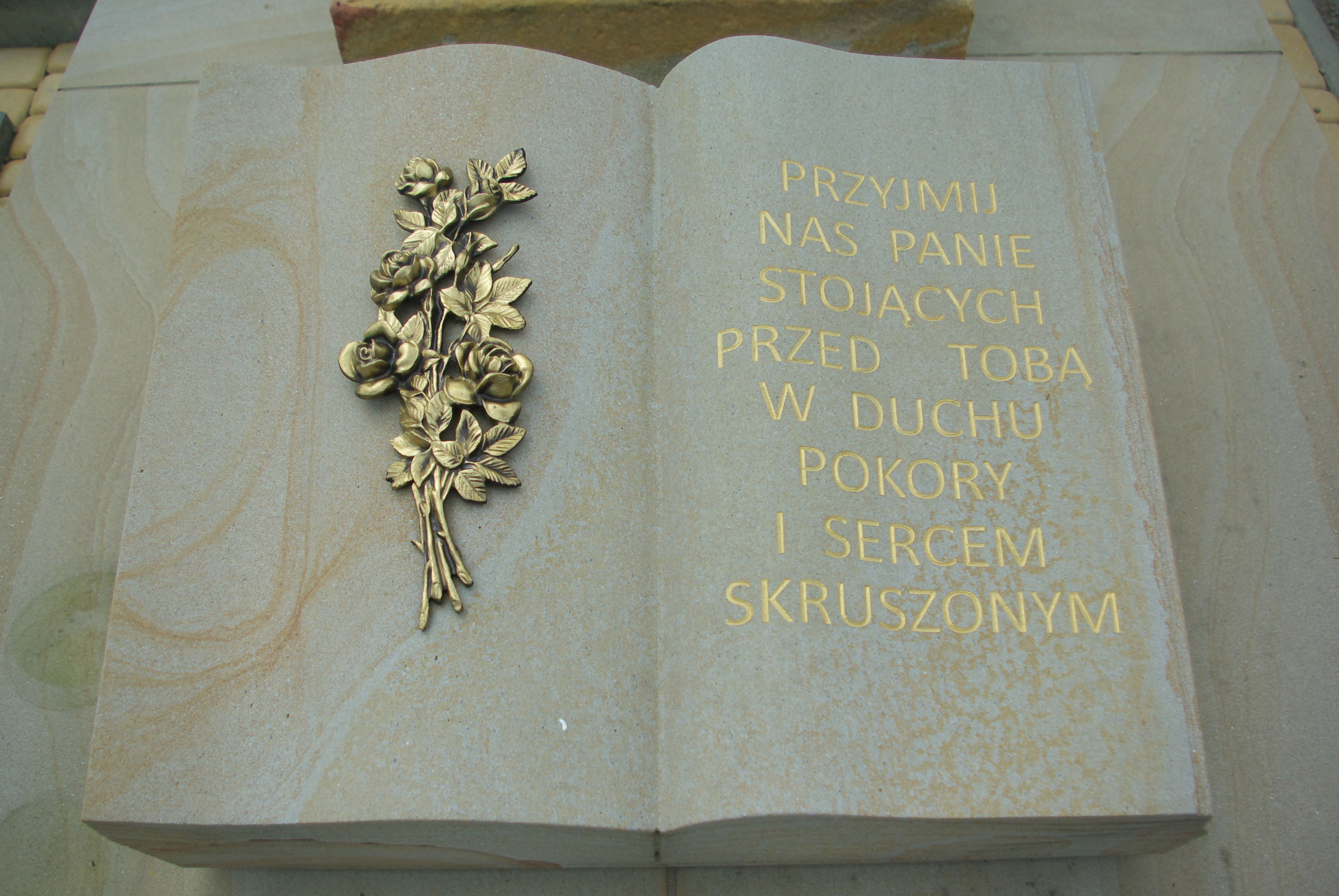 Nagrobek Adolfa i Amili Poźniak, ks. Wojciecha Dobrowolskia i Olgi Teodorowicz z Łozińskich na Cmentarzu w Nowotańcu.